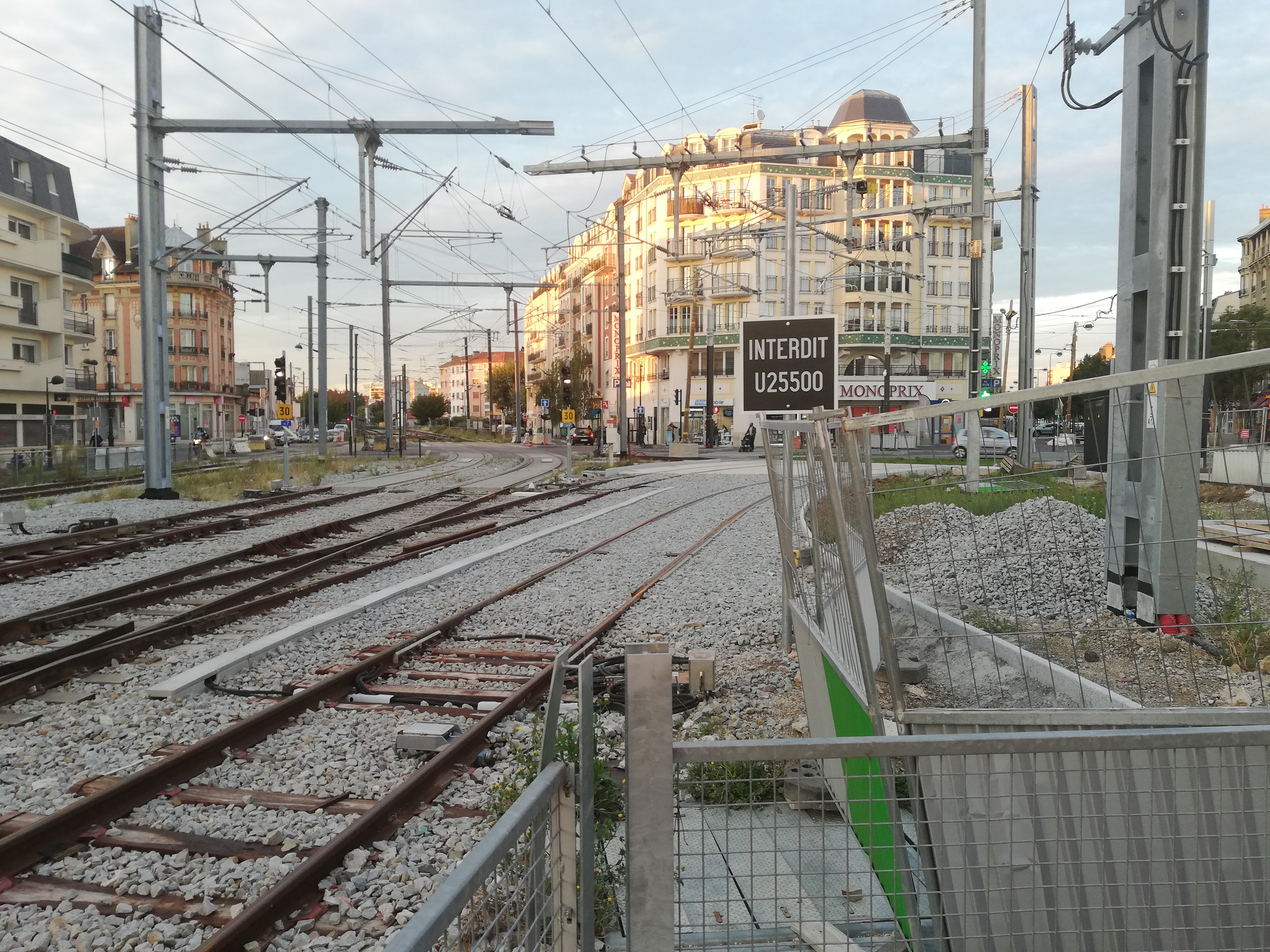 Séparation des branches Aulnay-sous-Bois et Montfermeil à la gare de Gargan, peu avant l'ouverture de la branche Montfermeil, en octobre 2019. On peut remarquer l'interdiction d'accès aux Siemens Avanto.